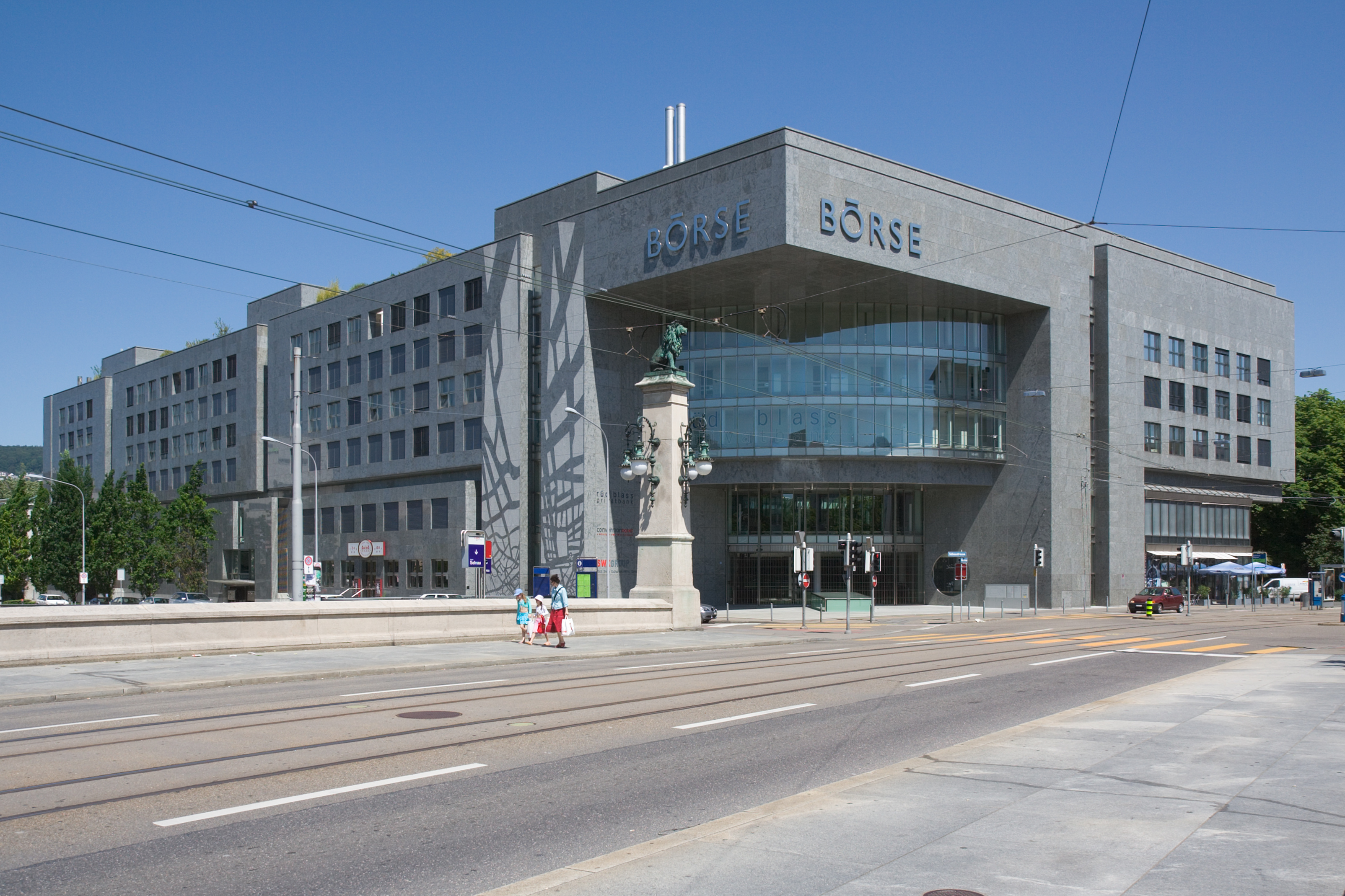 Börse Zürich, Schweiz